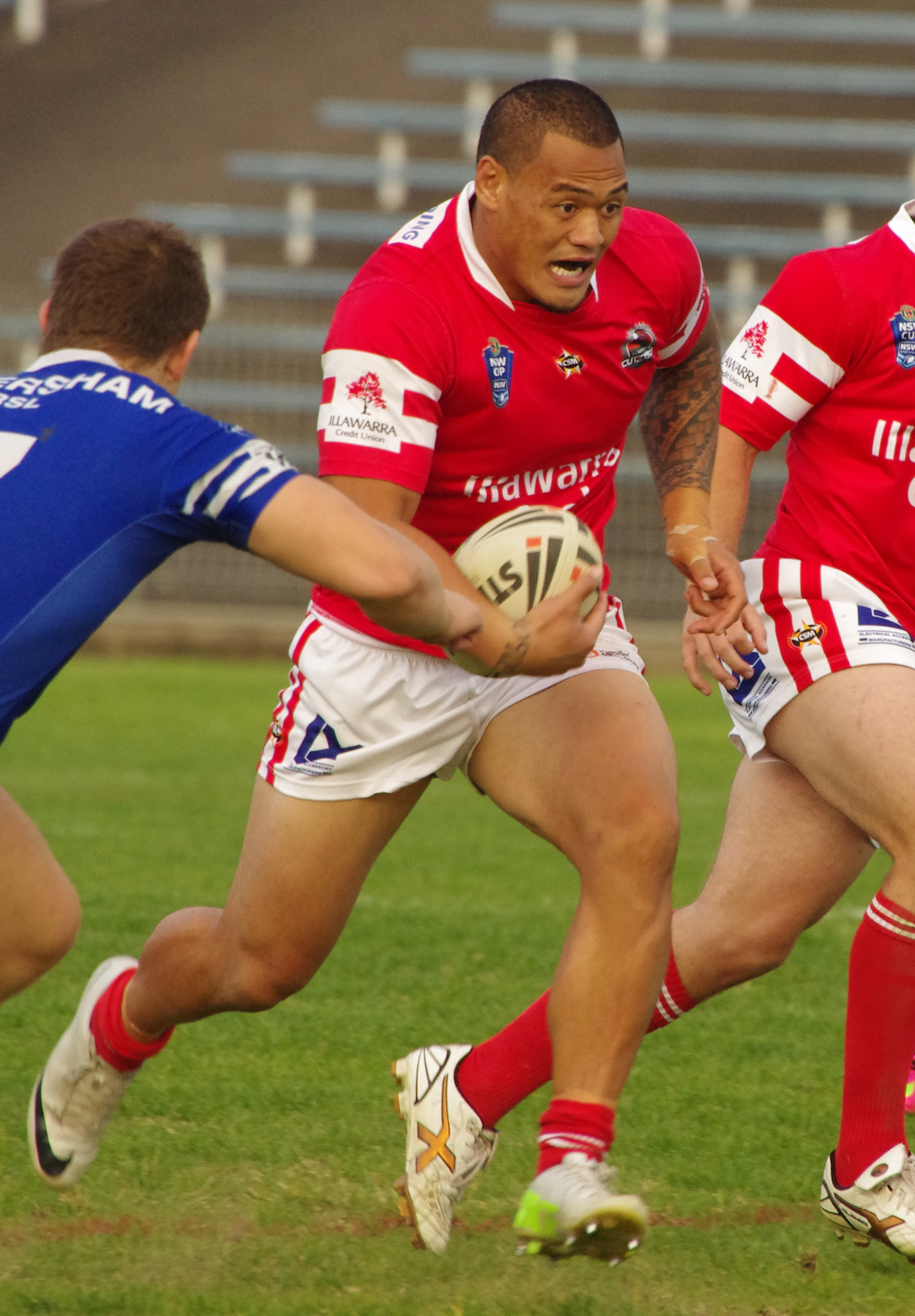 LEESON AH MAU